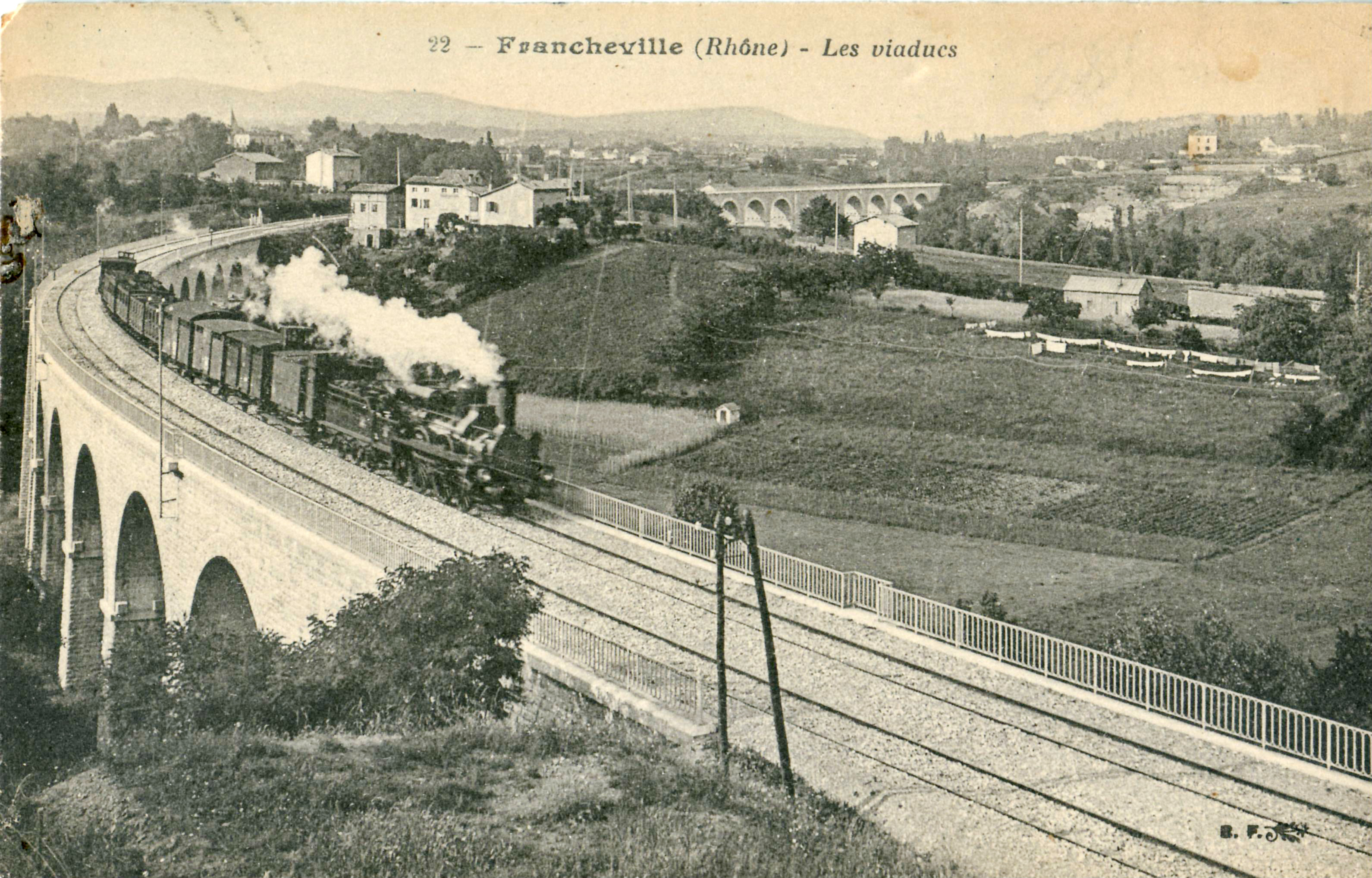 Carte postale ancienne éditée par BF à Paris :FRANCHEVILLE - Les viaducs.